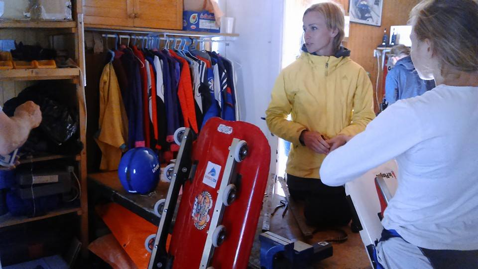 Maija tiruma la coach du club de bobsleigh luge skeleton de la plagne